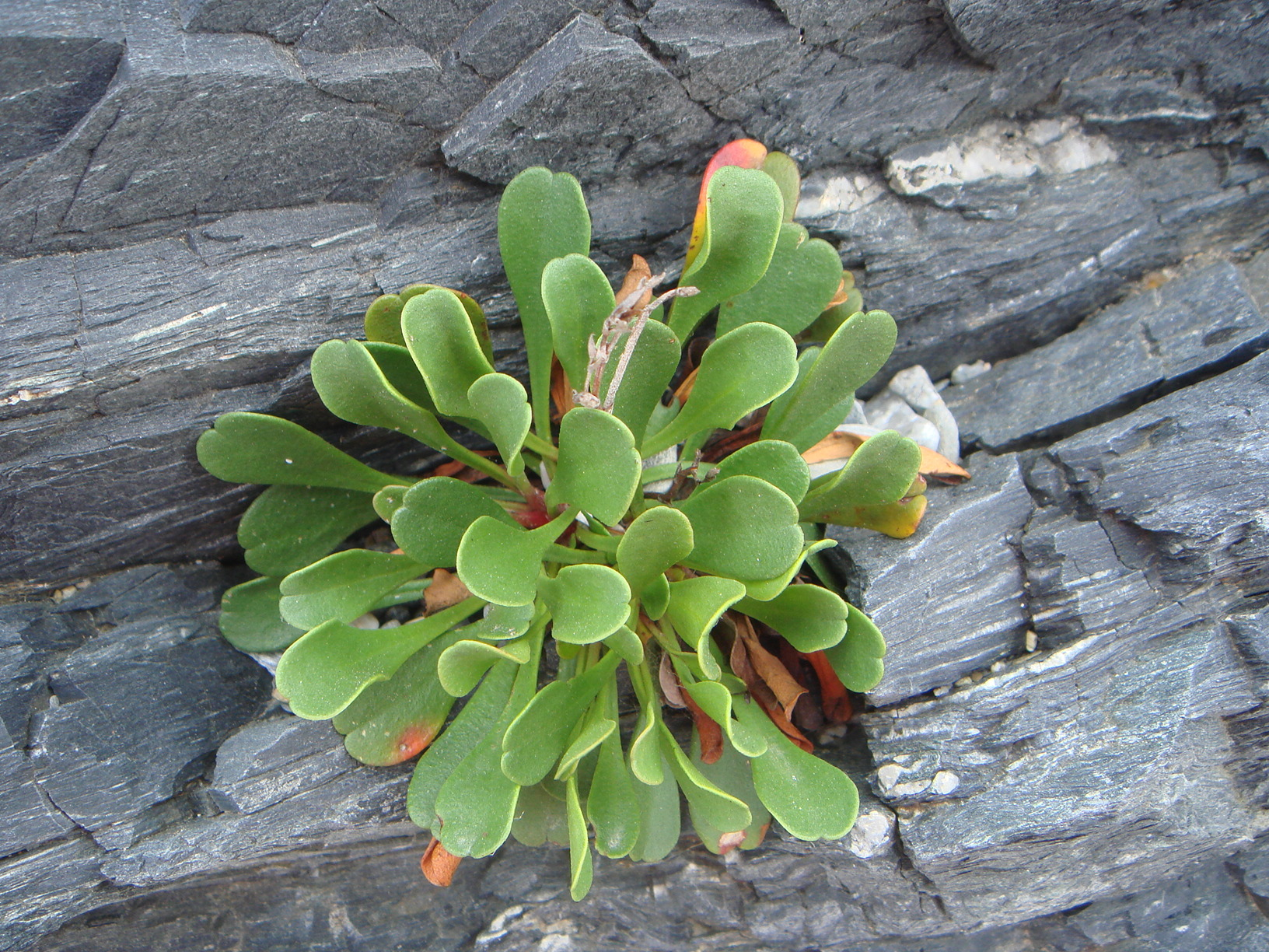 Limonium emarginatum, Ceuta (España)